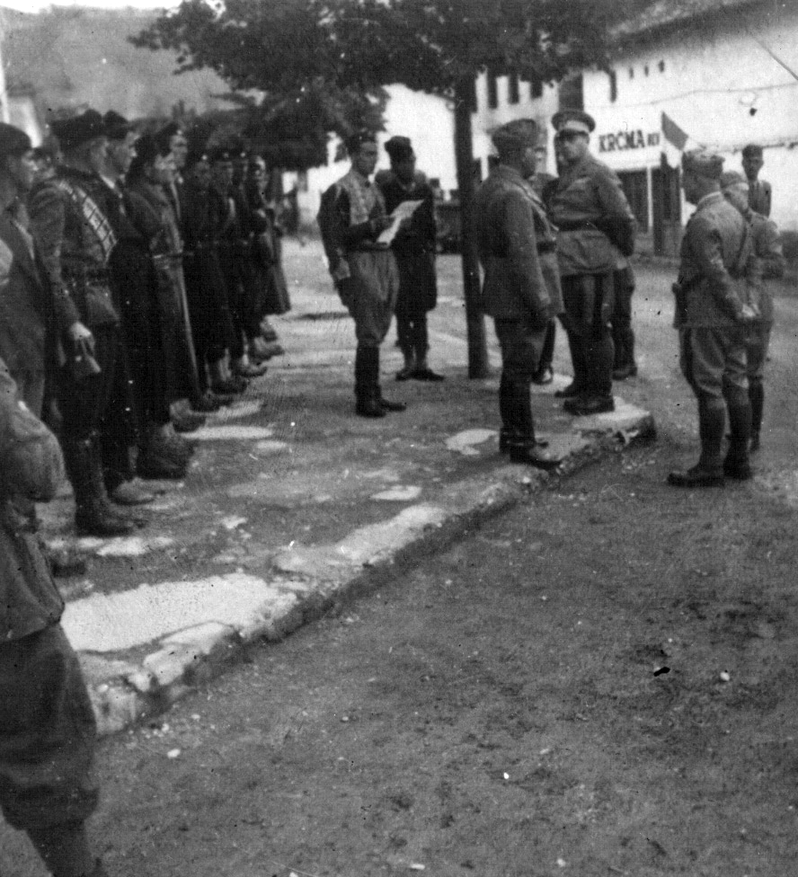 Srpskohrvatski / српскохрватски: Četnički komandant Đorđije Lašić predaje raport generalu Pirciju Biroliju, italijanskom guverneru Crne Gore.